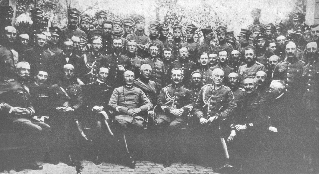 Uroczystość otwarcia Oficerskiej Szkoły Aeronautycznej w Poznaniu 21 maja 1919 roku.